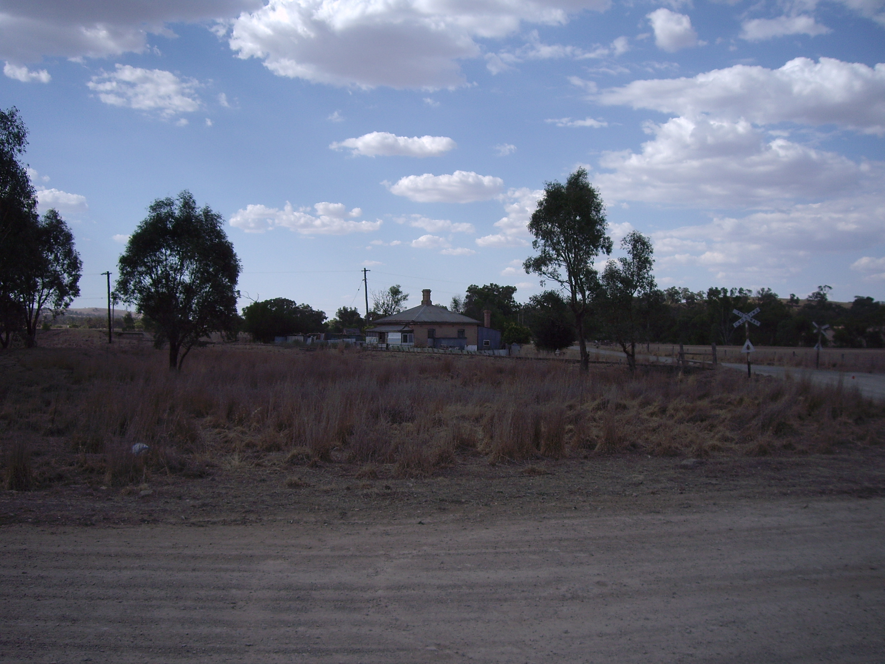 Brawlin